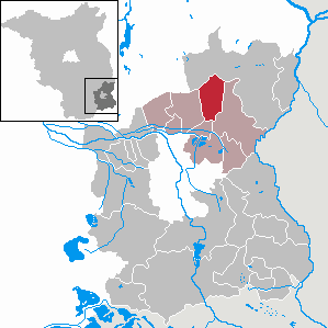 Tauer in Brandenburg (Country) - District Spree-Neiße